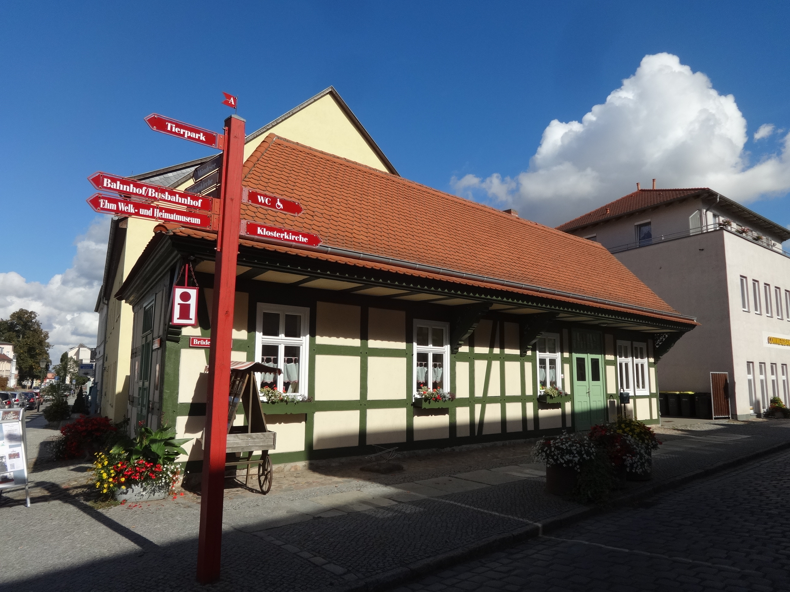 Die Ratswaage in Angermünde ist ein denkmalgeschütztes Bauwerk aus dem Jahr 1752. In dem Gebäude stand ursprünglich die Ratswaage, anschließend nutzte ein Infanterieregiment sowie die Feuerwehr das Gebäude. Seit 2000 ist es Sitz der Tourismusinformation.